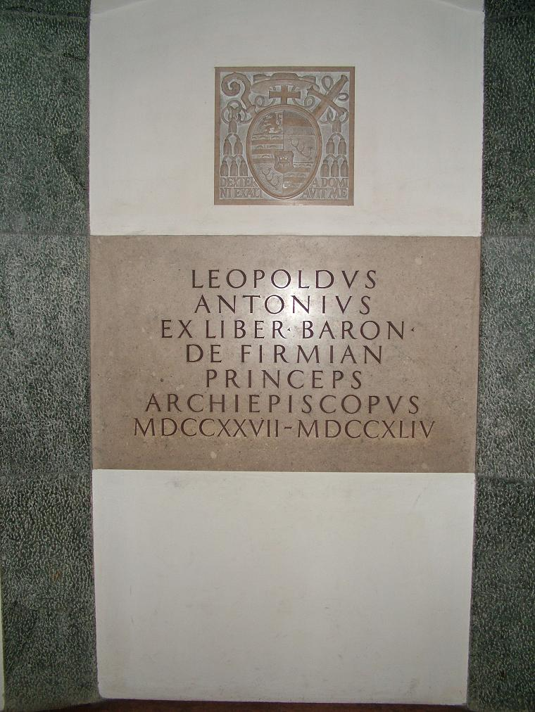 Grab Erzbischof Firmian in Salzburg